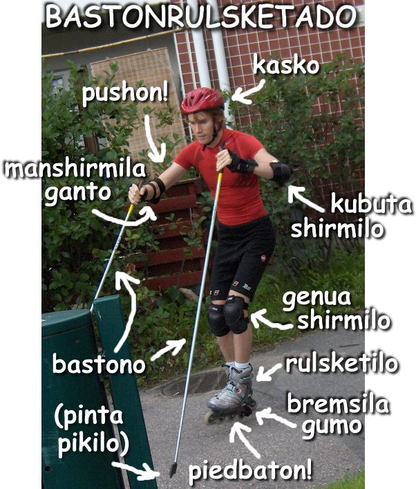 Bastonrulsketada bildvortareto publikita en EsperHe-Bulteno 1/2007